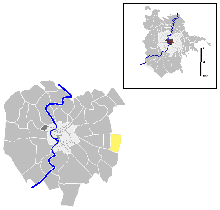 Alessandrino